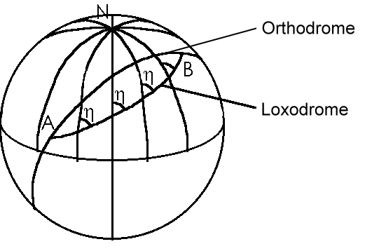 Unterscheidung Loxodrome – Orthodrome